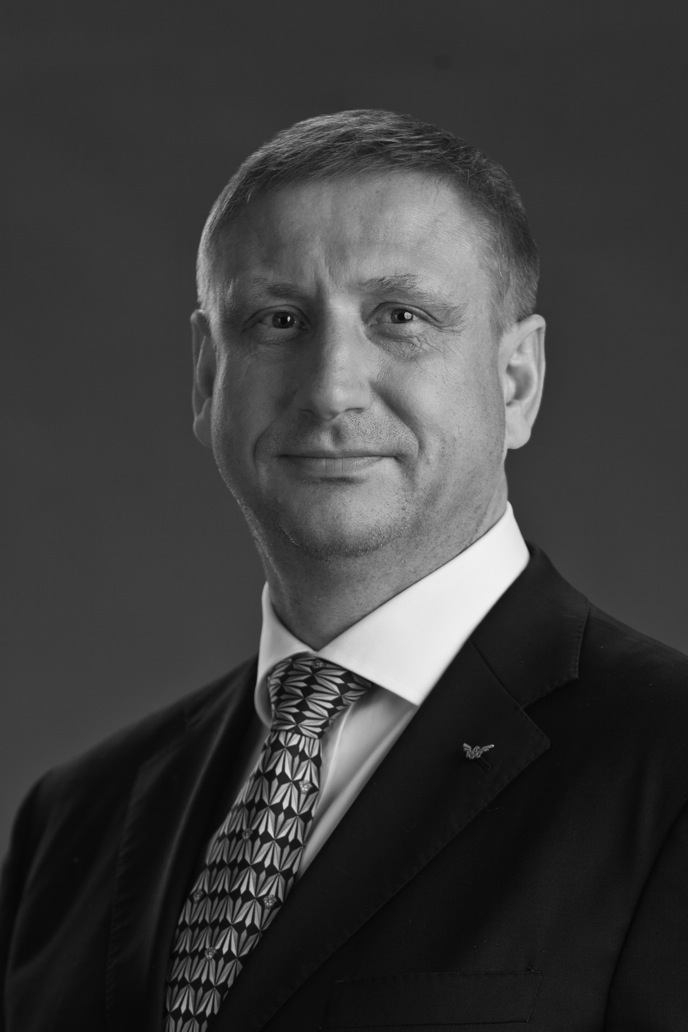 President and CEO of ESC Global Security